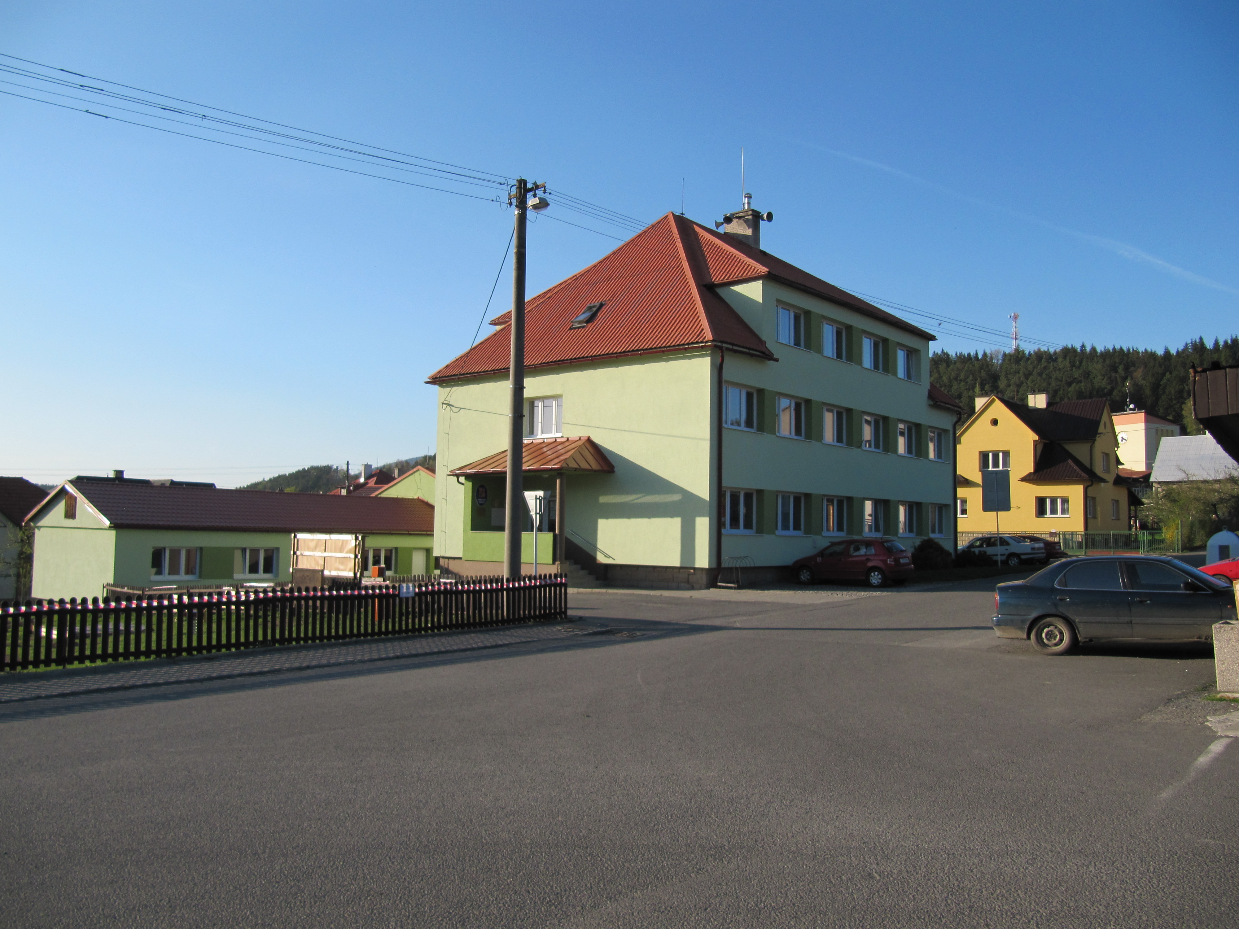 Hutisko